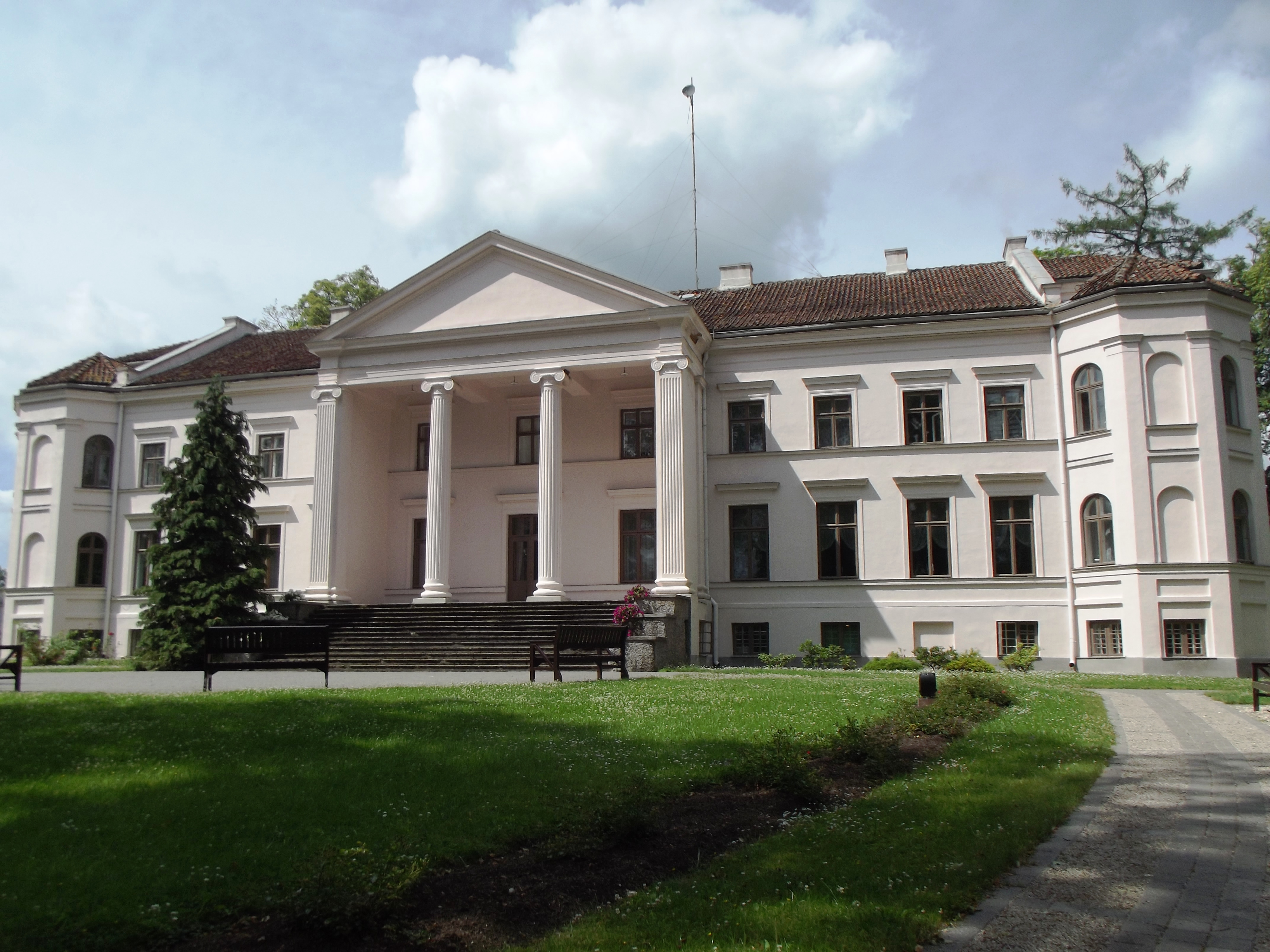 Īvandes (Lielīvandes) muiža jeb Groß Iwanden